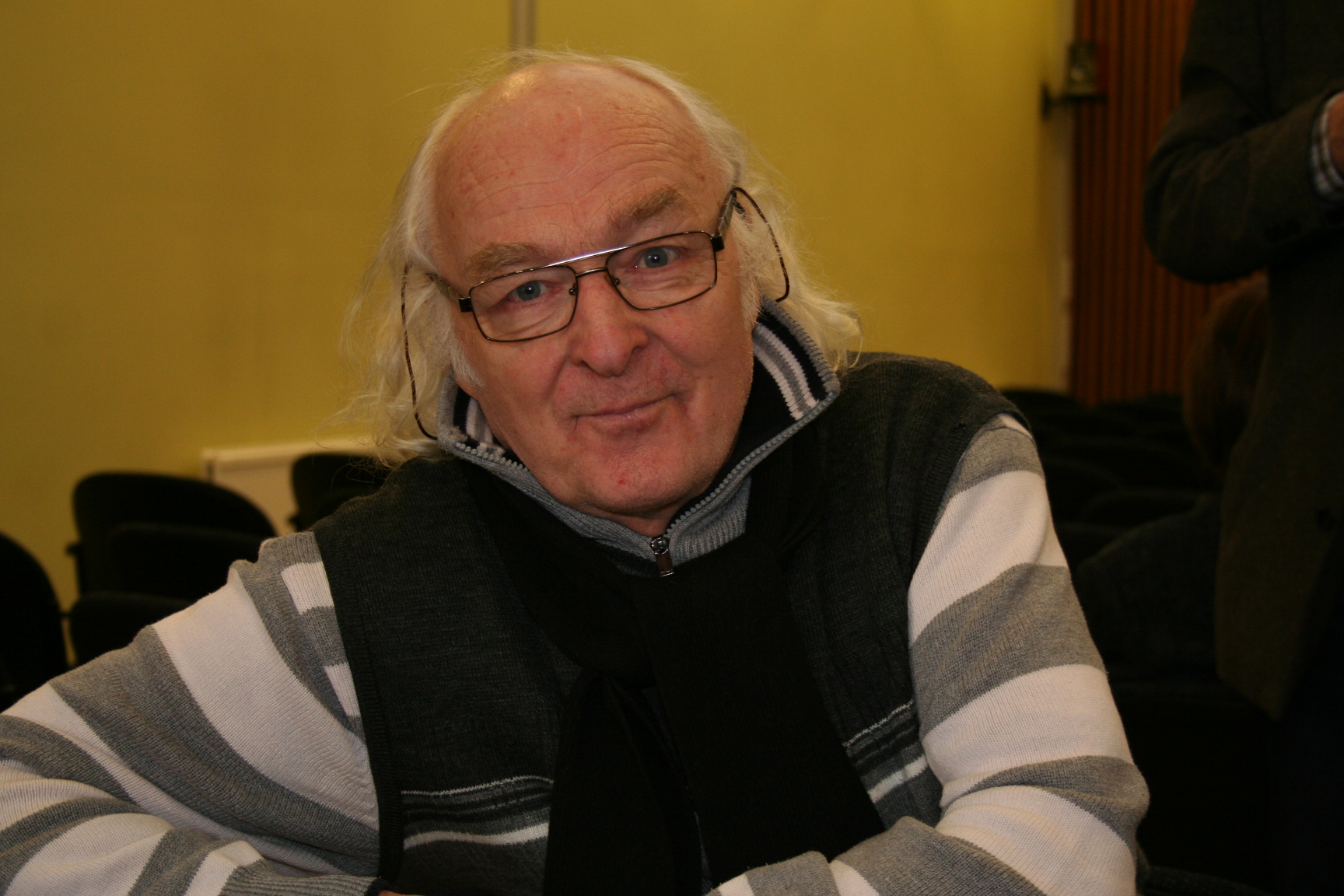 Vaapo Vaher Kirjanike Liidu üldkogul Tartus 23. märtsil 2012.